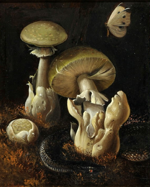 "Unsterblichkeit - Falter, Knollenblätterpilz und Schlange", Öl auf Karton, 20,5 x 17 cm